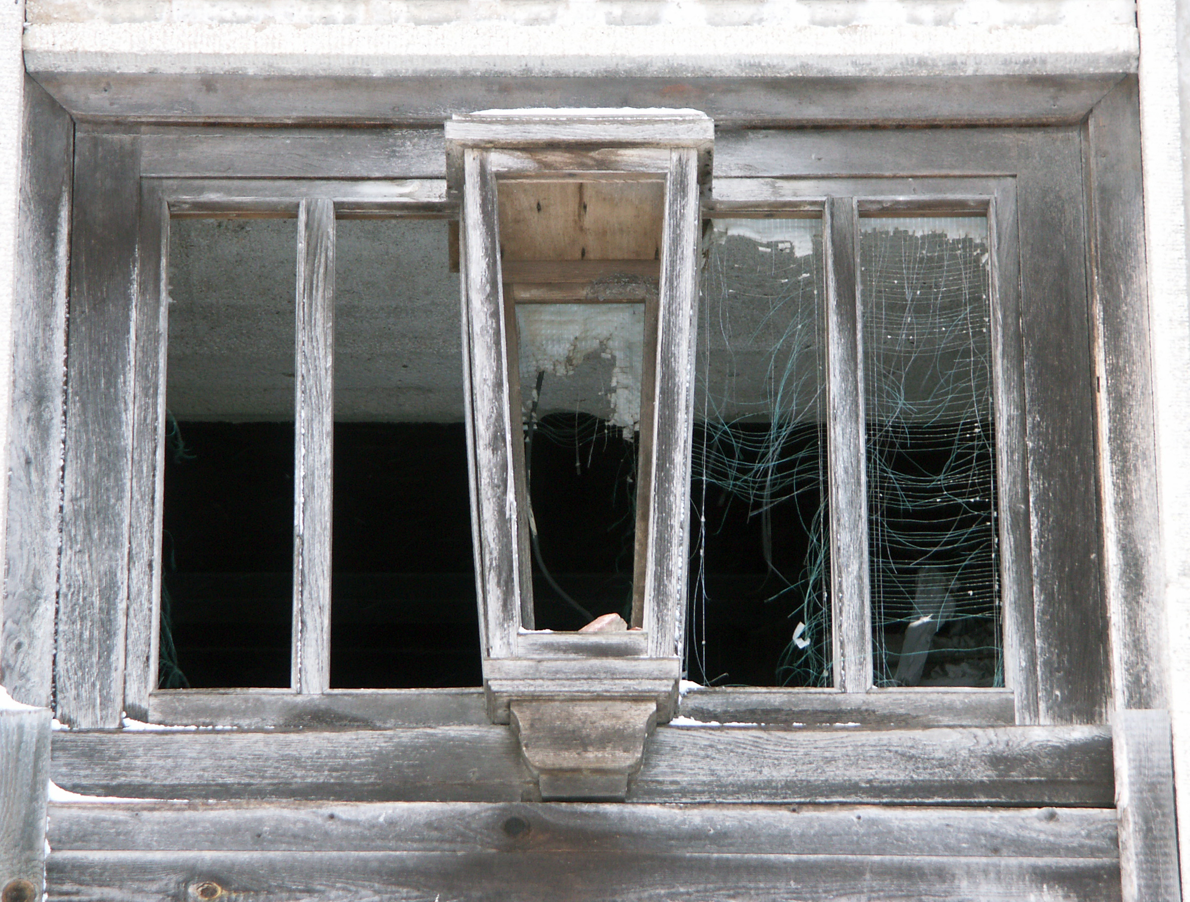 Detailansicht des Kulturhauses Zinnowitz